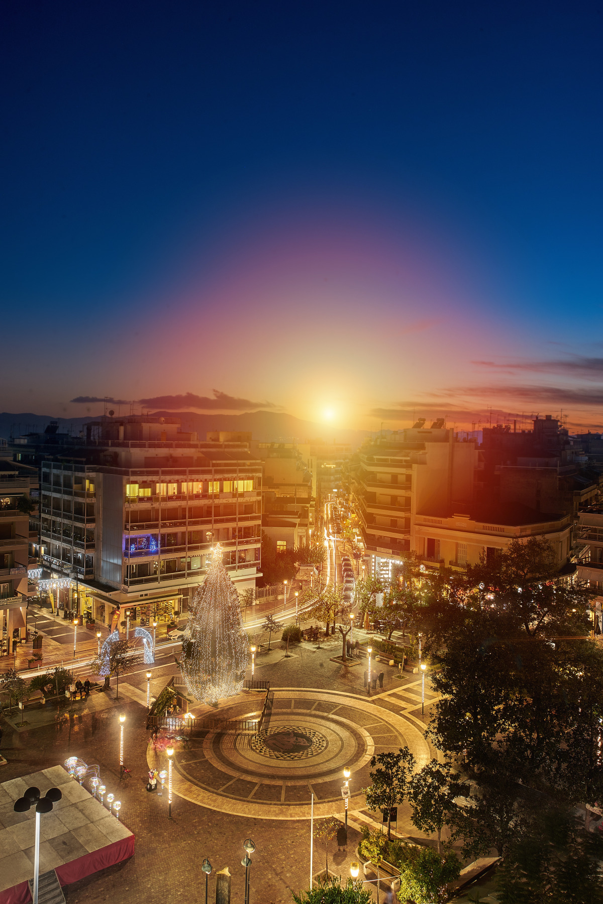 Χριστούγεννα στη Κεντρική πλατεία